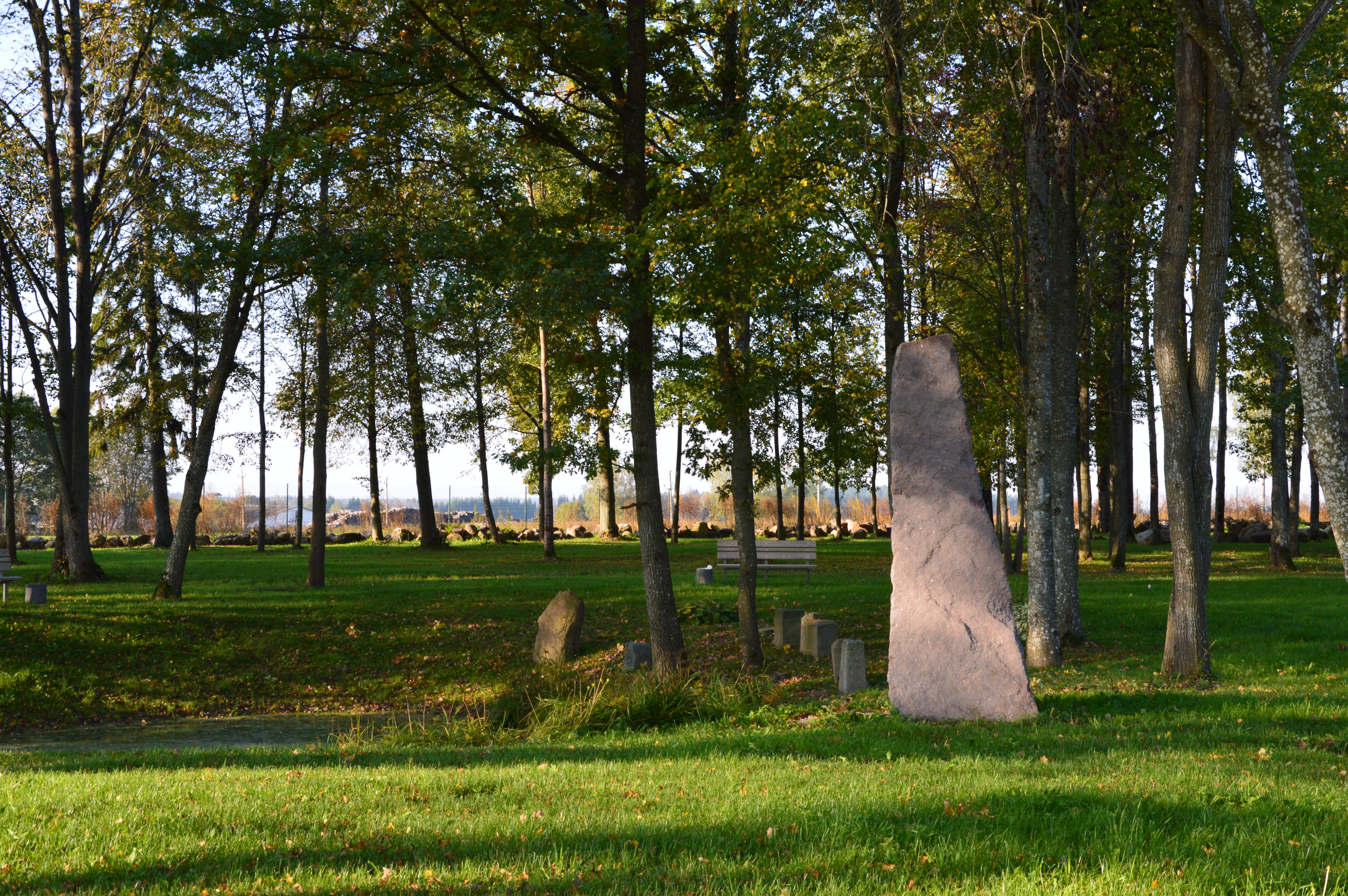 Luunja mõisa kalmistu